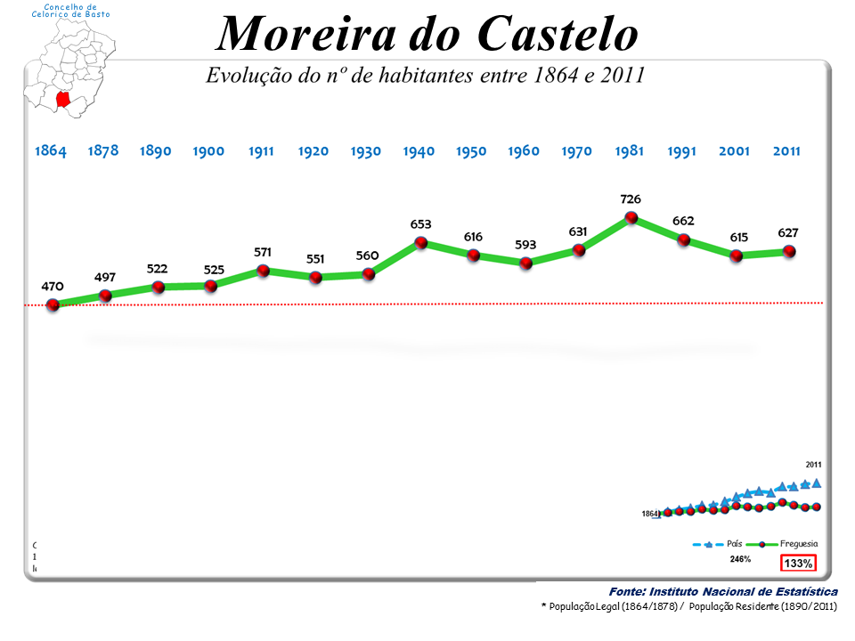 Censos 1864/2011